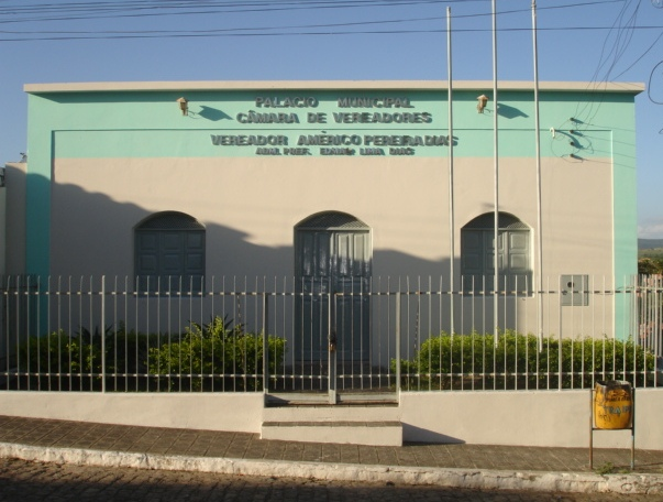 Câmara municipal da cidade de Traipu - Alagoas